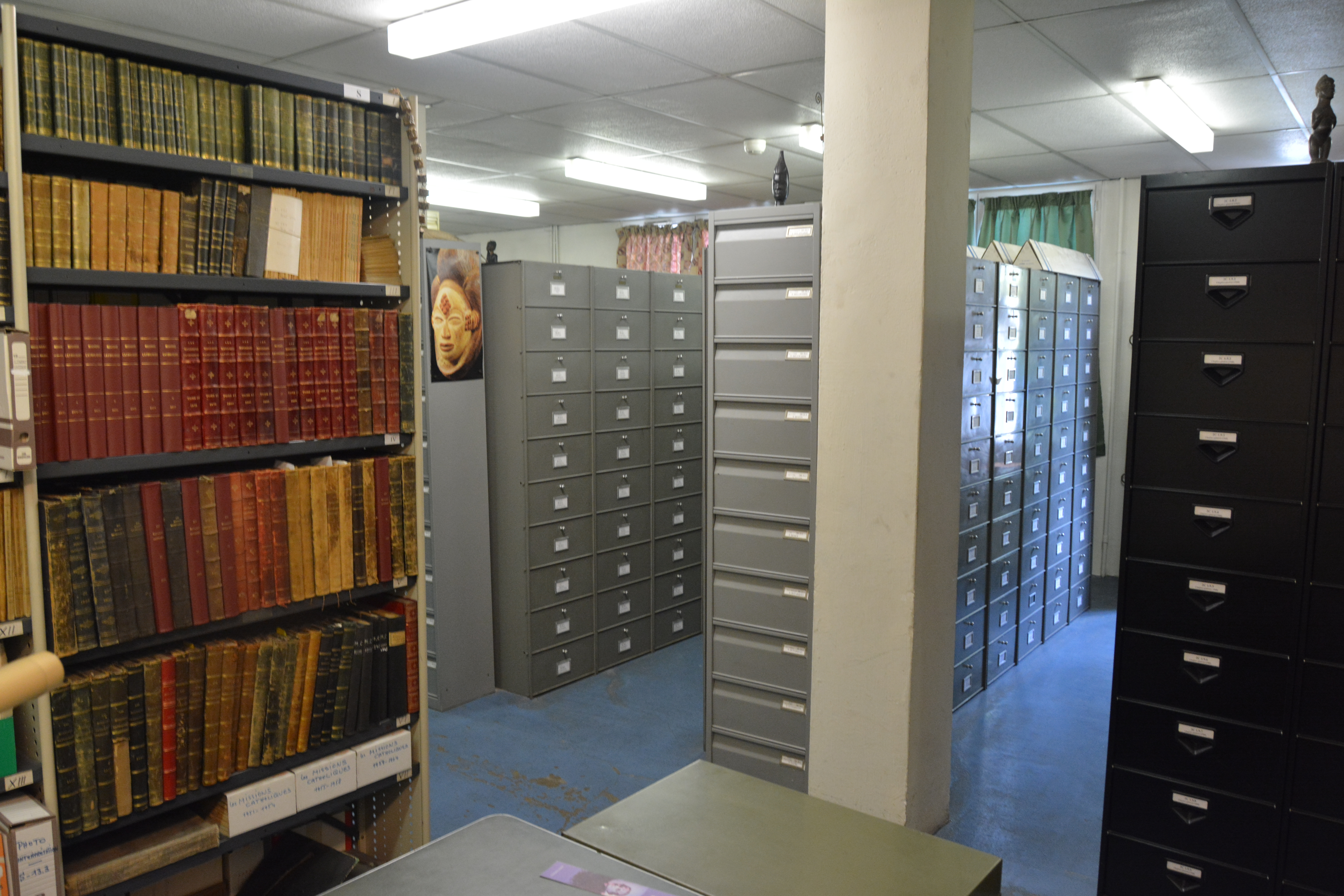 Vue d'une partie des archives de la Congrégation du Saint Esprit conservées à la communauté spiritaine de Chevilly-Larue